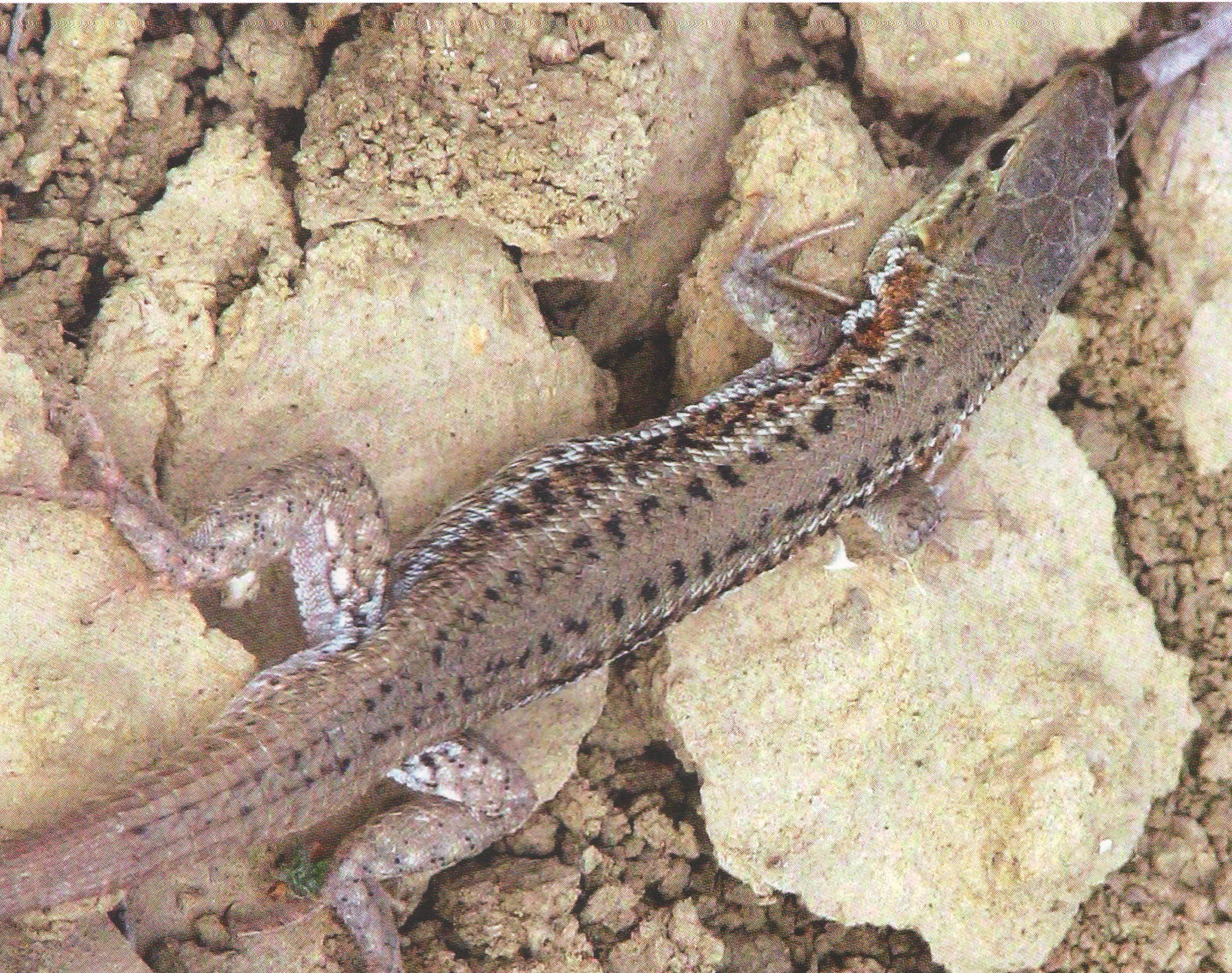 Biçimli İlandaş kərtənkələ